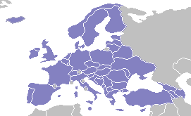 Carte des États dans comptant un conseil national du Mouvement européen.